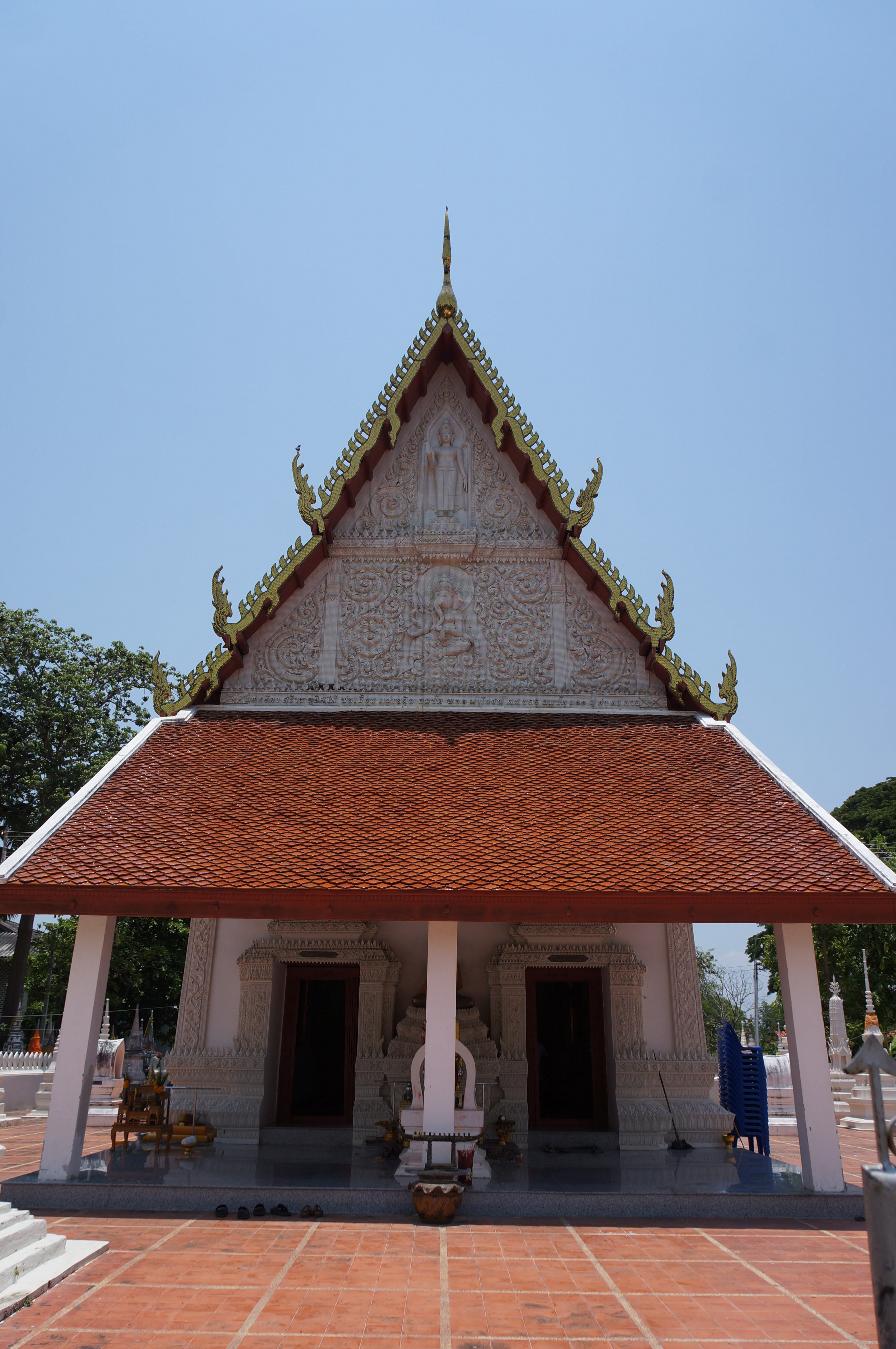 วัดท่าไชยศิริ เป็นวัดในพระพุทธศาสนาเถรวาท สังกัดคณะสงฆ์มหานิกาย ที่ดำเนินกิจกรรมทางพระพุทธศาสนา บ้านสมอพลือ ถนนเพชรเกษม หมู่ที่ ๑ ตำบลสมอพลือ อำเภอบ้านลาด จังหวัดเพชรบุรี